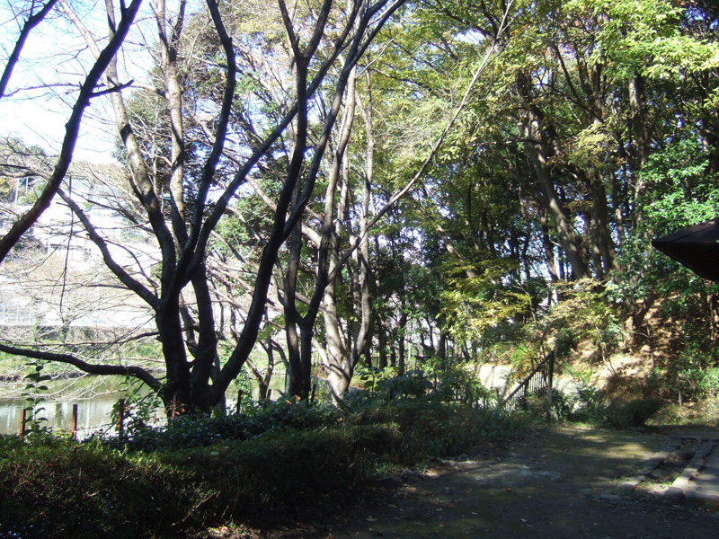 籠口ノ池公園